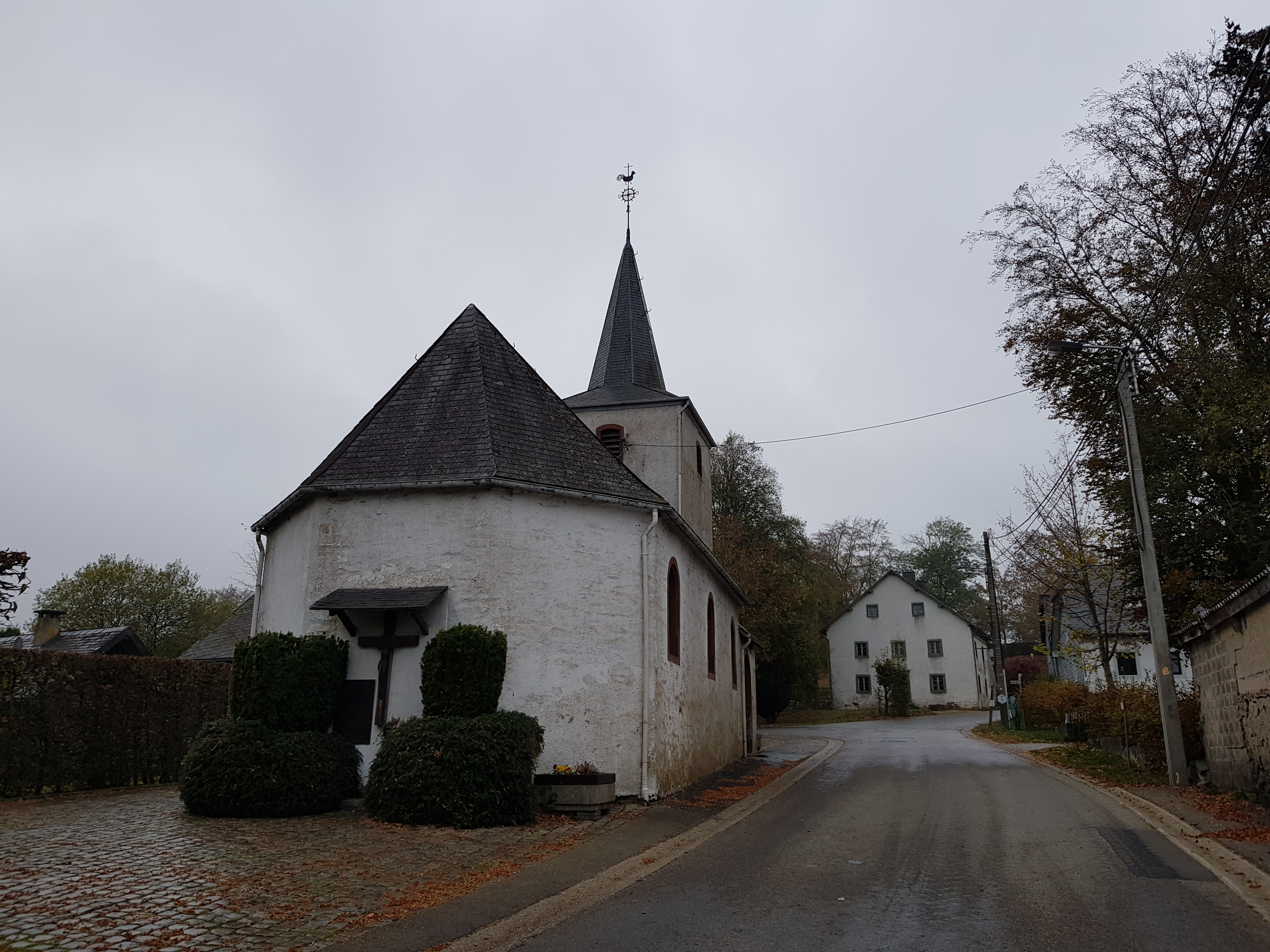 Kapelle St. Kornelius, Holzheim, Büllingen, Belgien von 1665 This photo of immovable heritage has been taken in the Walloon Region